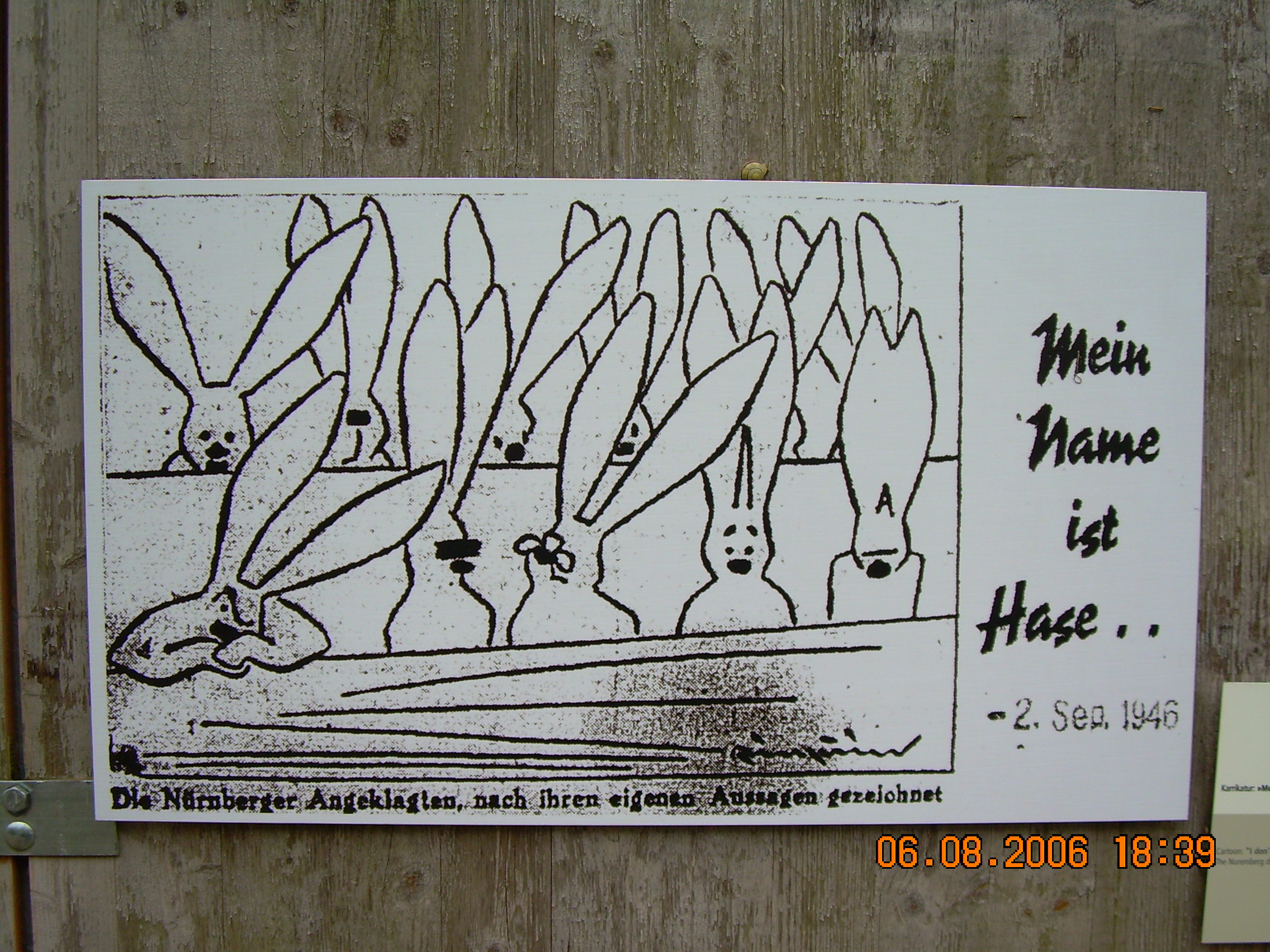 Karikatur zu den Nürnberger Prozessen